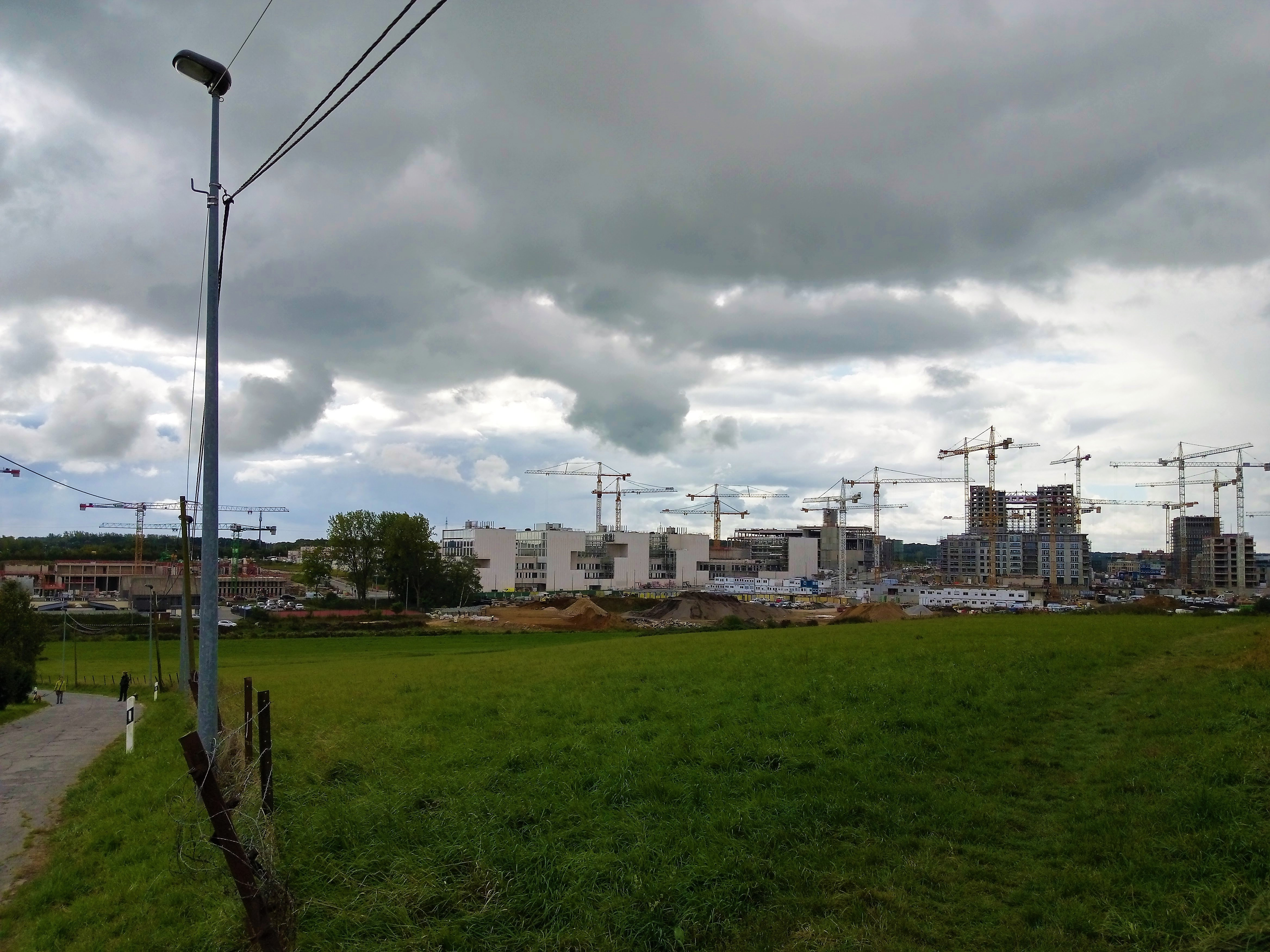 Luxembourg, Gasperich, lieu-dit Bei der Kéiwiss: endroit du futur Parc de Gasperich. Au bord gauche de la photo, partie de la rue W. A. Mozart